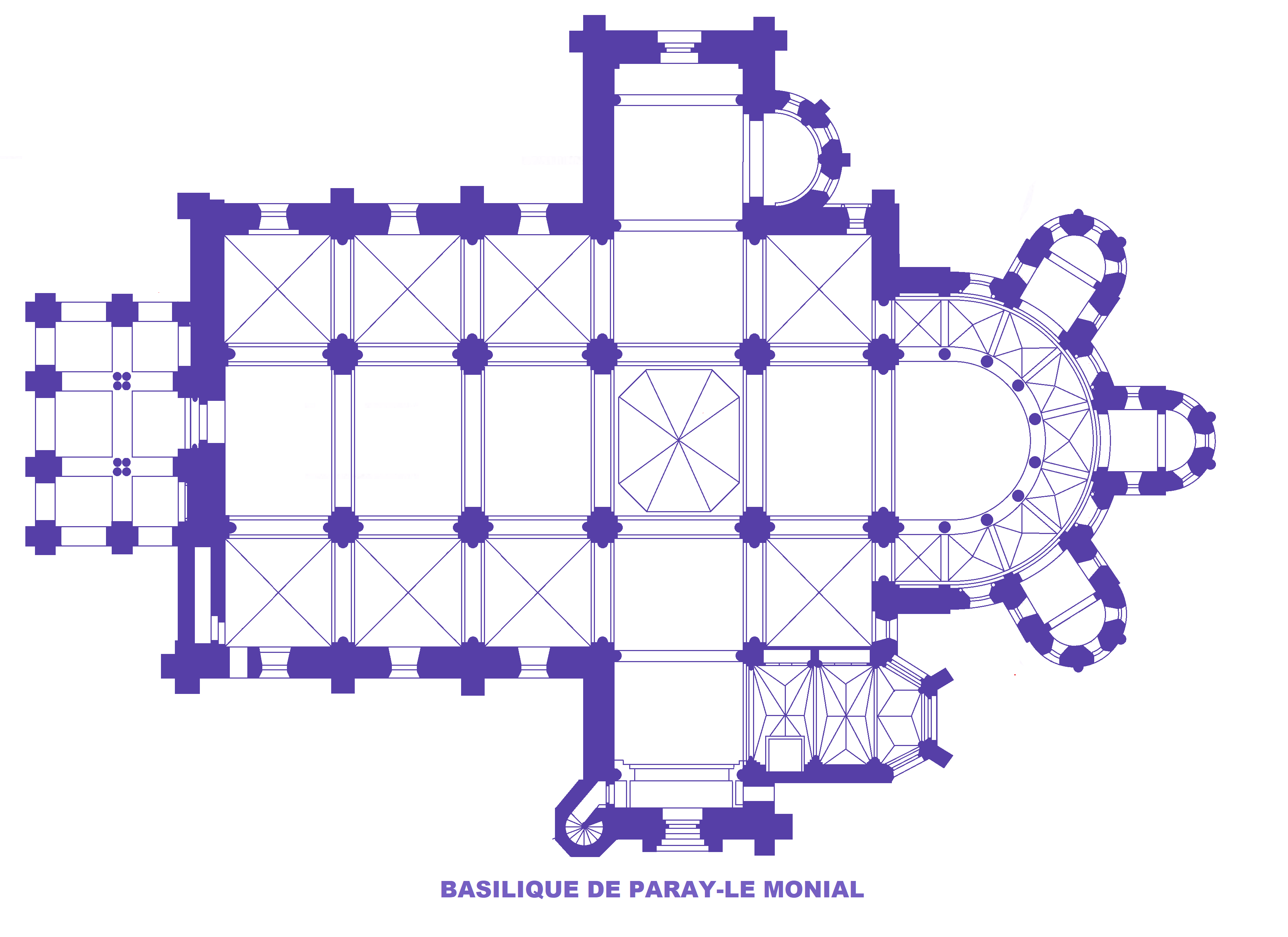 Basilique de Paray-le Monial, Plan